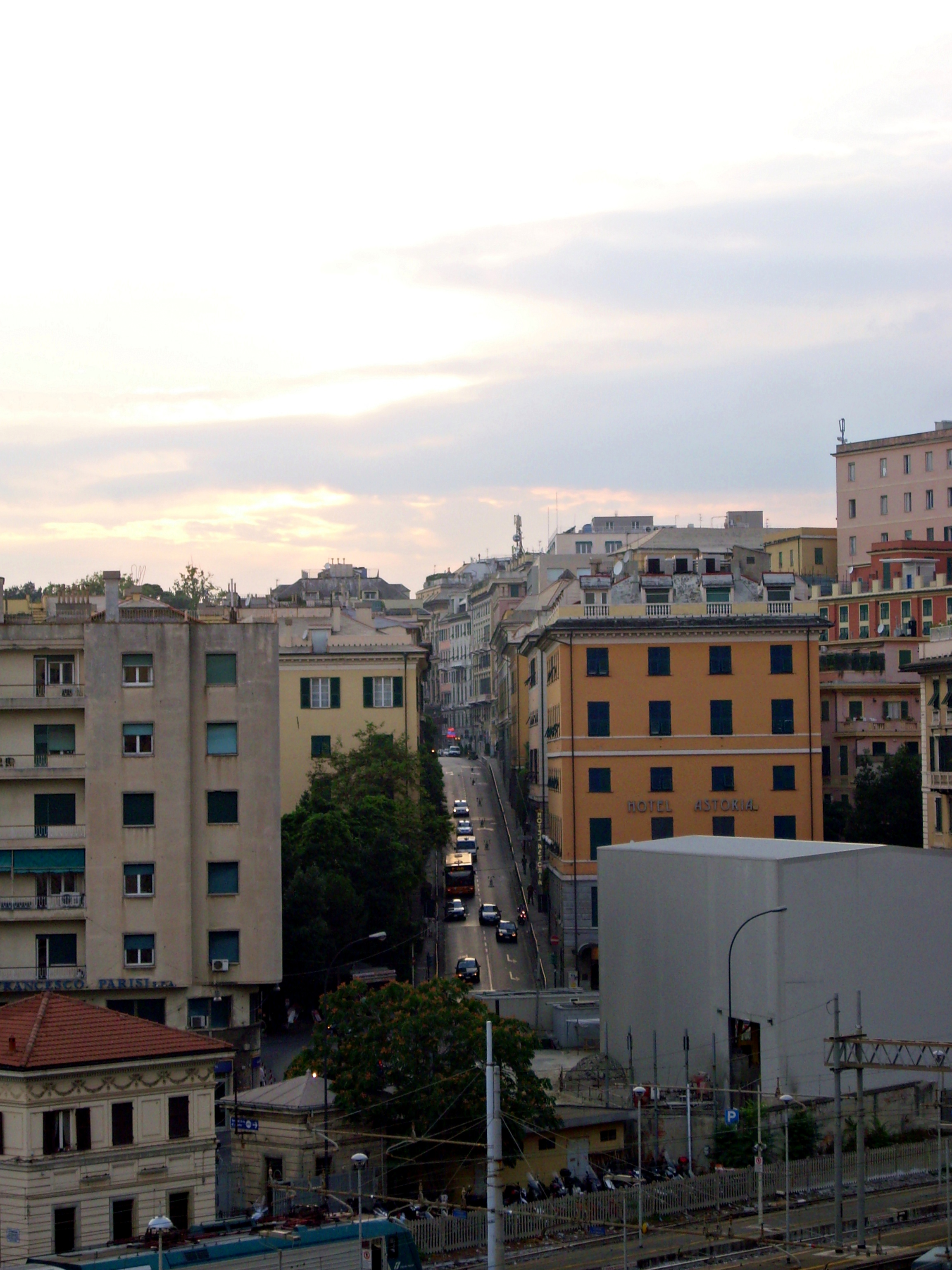 Via Serra a Genova, fotografata da sopra la stazione ferrociaria di Genova Brignole